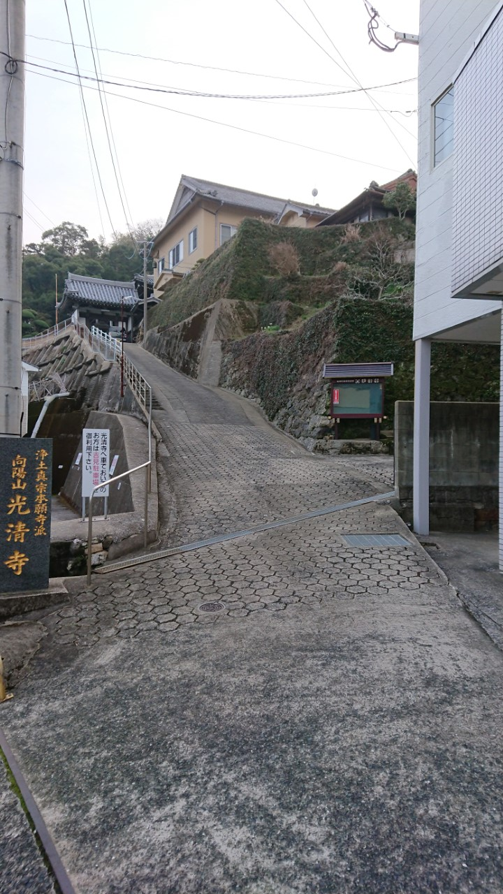 長崎県対馬市厳原町久田道にある寺院。